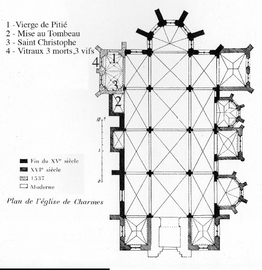 Plan de l'eglise de Charmes